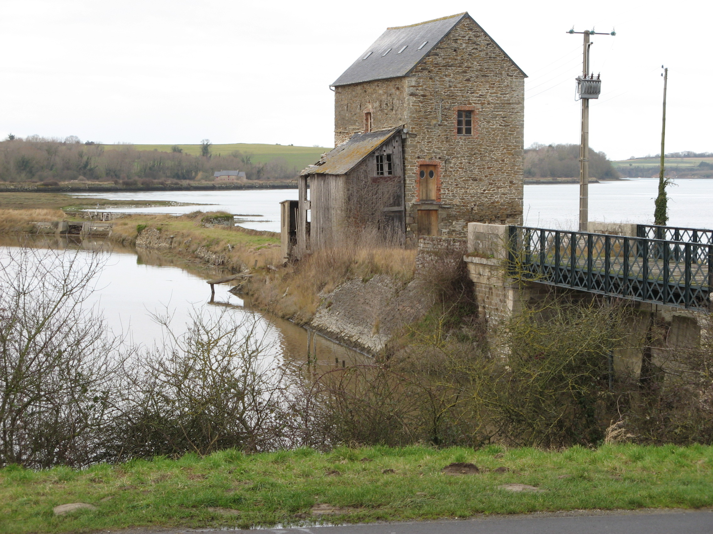 Saint-Suliac : Moulin à marée de Beauchet